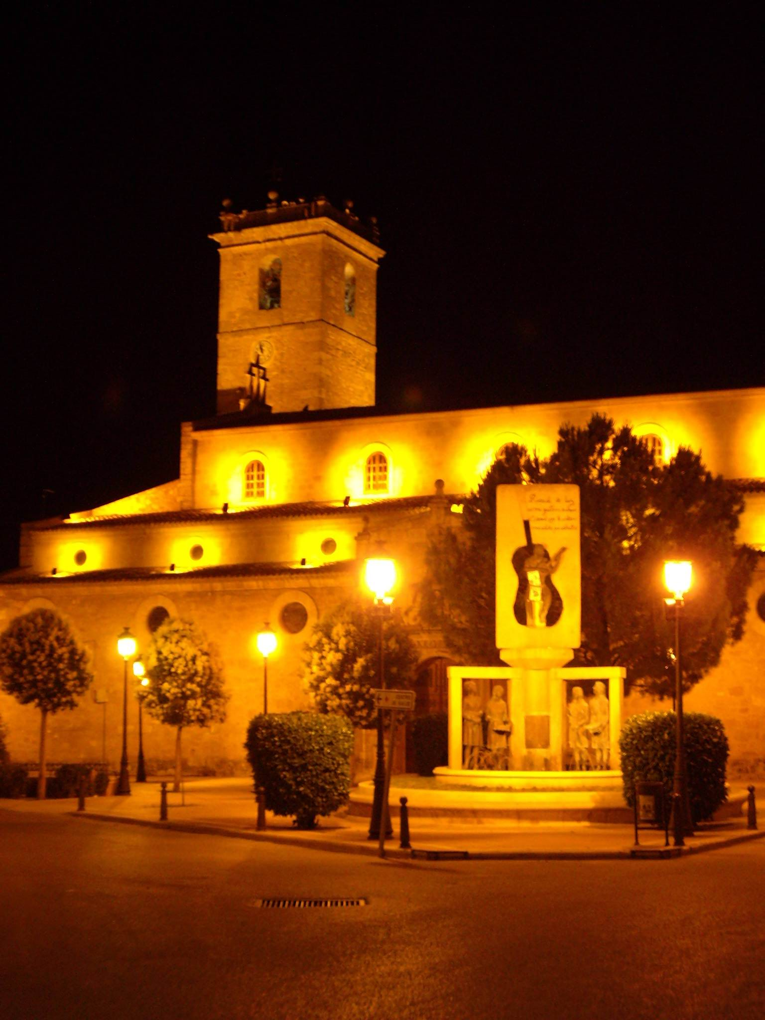 Esta es una foto del conocido monumento de la guitarra, al fondo se sitúa la iglesia. Casasimarro, Cuenca, España